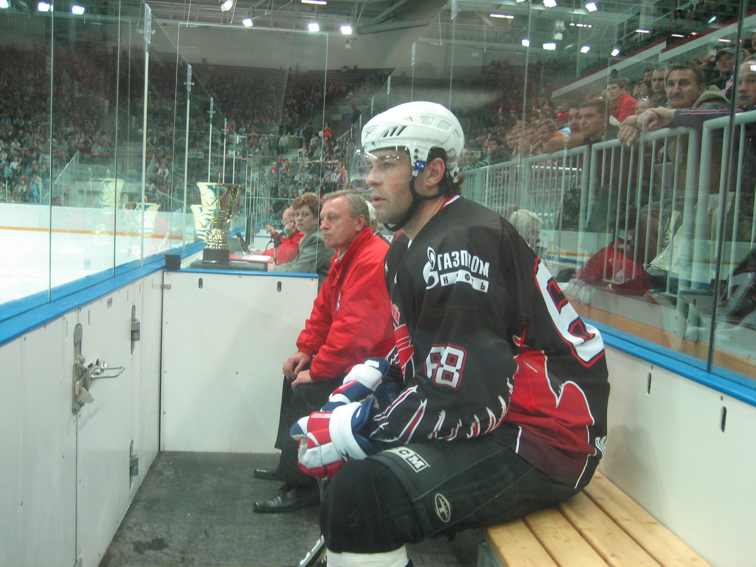 Яромир Ягр (чеш. Jaromír Jágr; 15 февраля 1972, д. Шмеров-Гнидусы (ныне — часть Кладно), Чехословакия) — выдающийся чешский хоккеист. Амплуа — правый нападающий. По набранным очкам в истории НХЛ занимает 8-е место в регулярных сезонах и 7-е место в плей-офф Кубка Стэнли. Является одним из лучших нападающих в мировом хоккее.